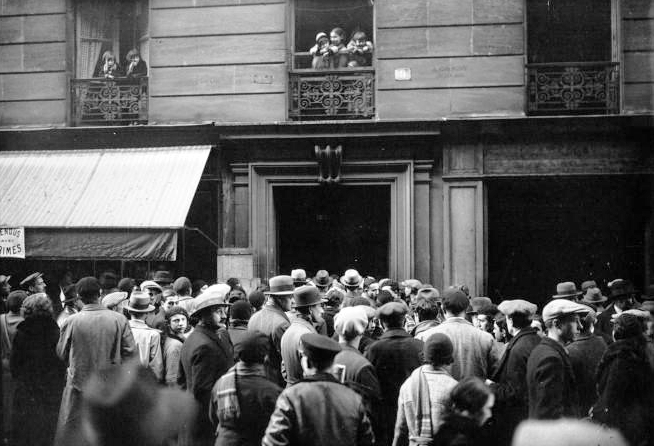 Reconstitution du crime de Violette Nozière au 9 rue de Madagascar, Paris 12e, en 1933.